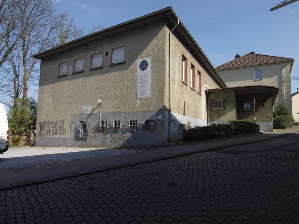 Distelbeck 36, Wuppertal Quartier Südstadt. Turnhalle des ESV (Eisenbahner Sportverein Wuppertal West e. V.) eingeweiht 1936